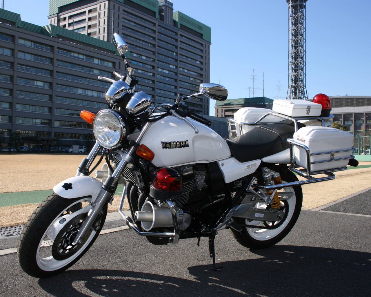 [全長]2,110mm [全幅]855mm [全高]1,085mm [重量]217kg [最高速度]160km/h [乗員]1人 [製作]ヤマハ発動機 警務用は、一般に交通統制および車両誘導等に使用する。